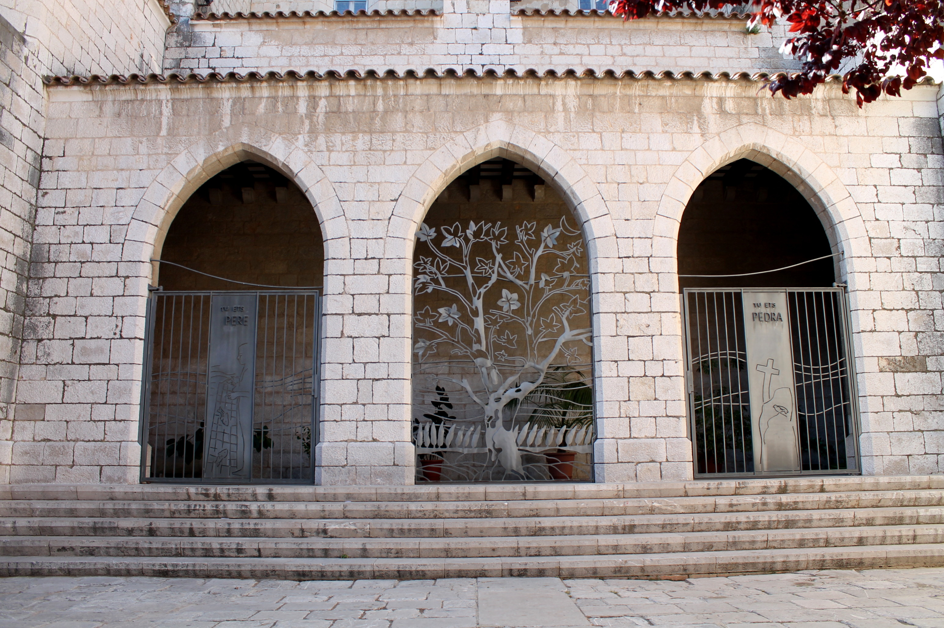 Eglise Sant Pere à FIGUERES (Catalunya)